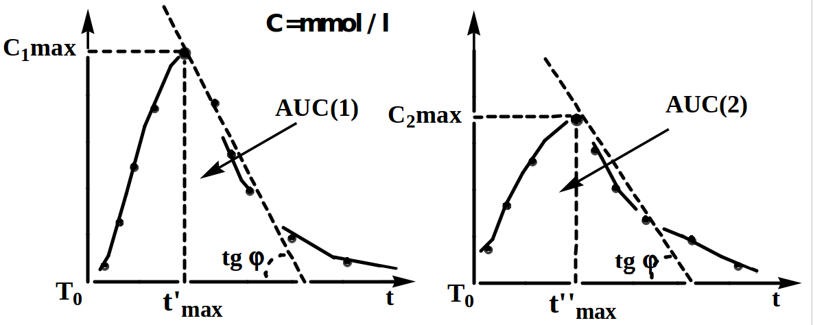 Ներերարկային (1-ին) ներարկման և այլ դեղաձևերի (2-րդ) ֆարմակակինետիկական կորեր